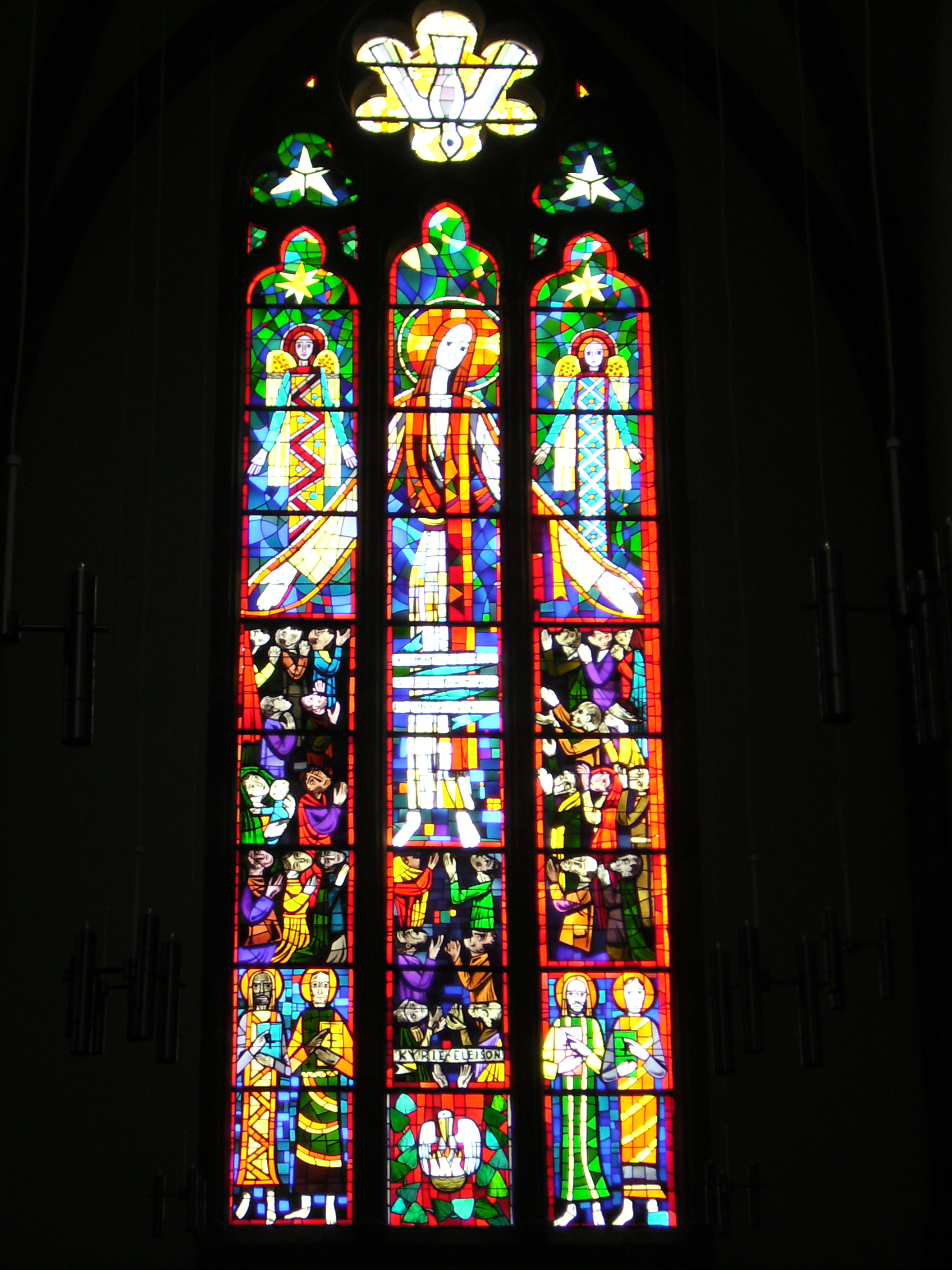 St. Arnual: Stiftskirche, Fenster des ungarischen Künstlers György Lehoczky